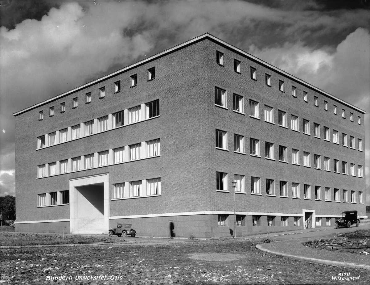 Universitetet på Blindern, farmasibygningen, biler